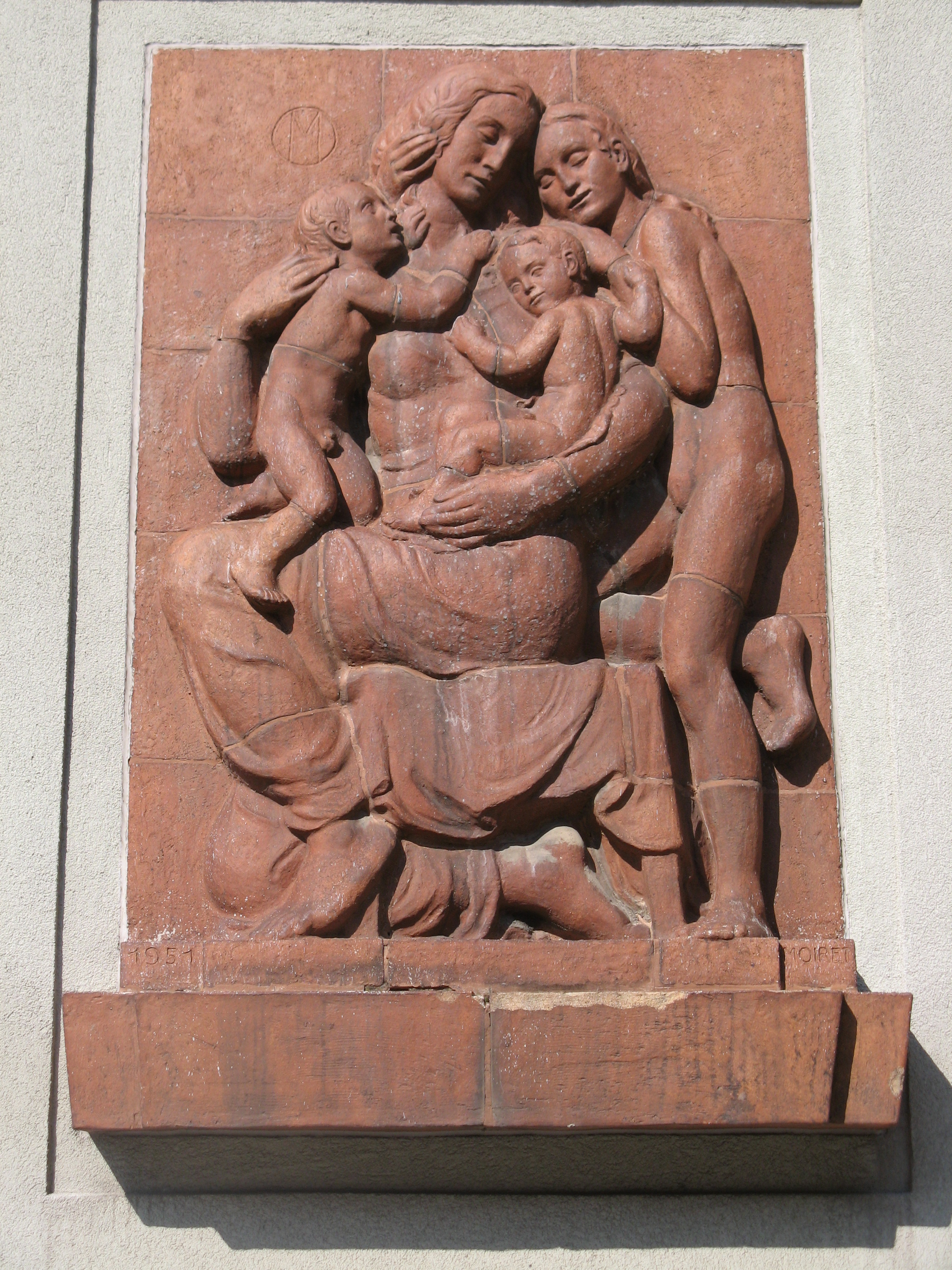 Mutter mit Kindern (1951), Keramikrelief von Moiret, Ettenreichgasse 42-44, Wien-Favoriten